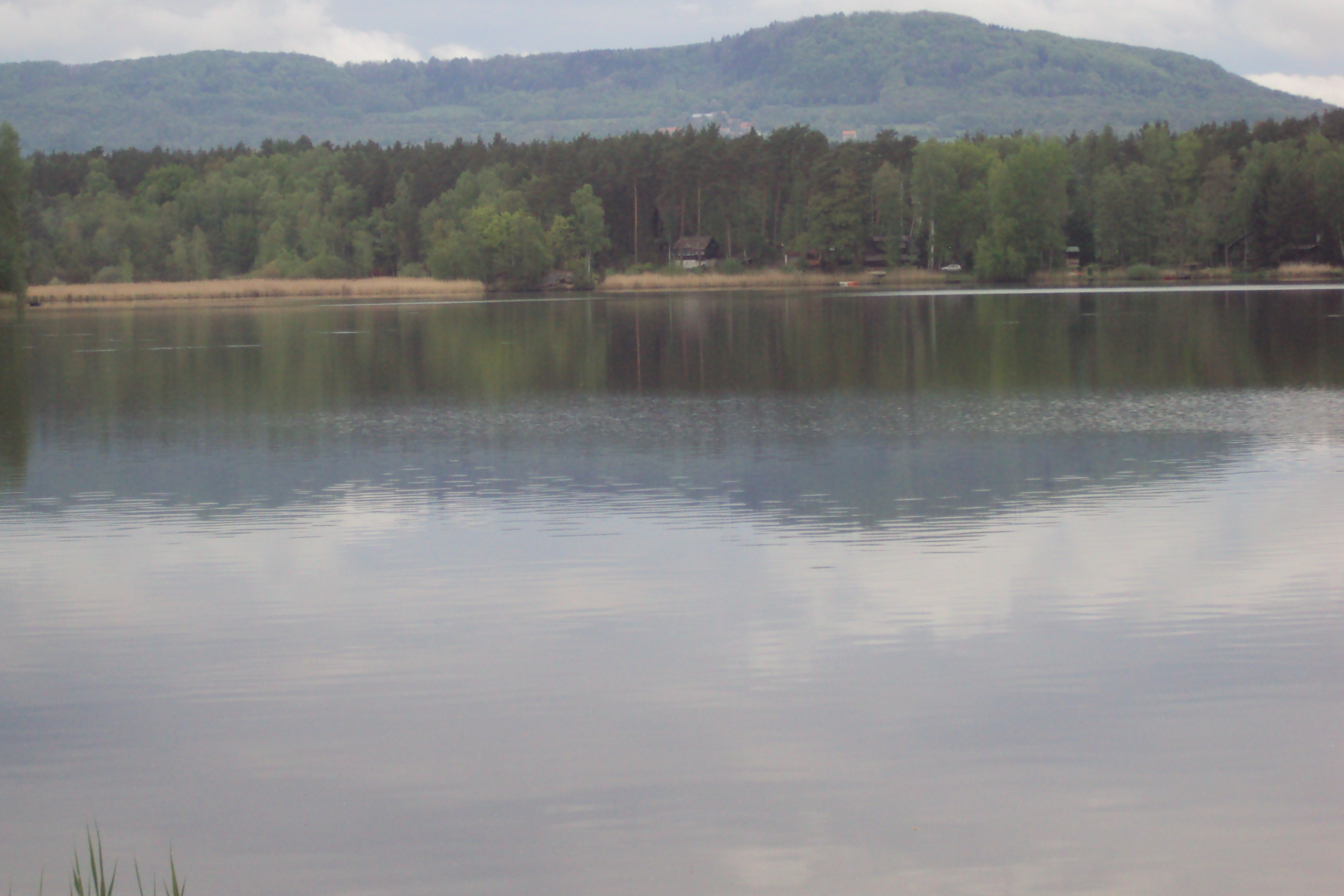 Z jižní strany Milčanského rybníka pohled na severní břeh, uprostřed rákosí je vidět ostrůvek se zříceninou Milčany